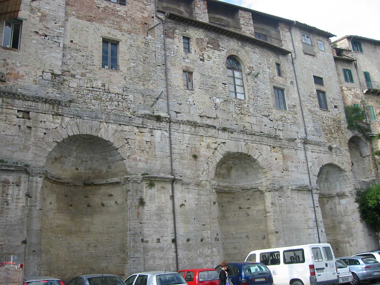 Gebäude in Todi. Fotografiert im September 2004 von Fantasy :-)